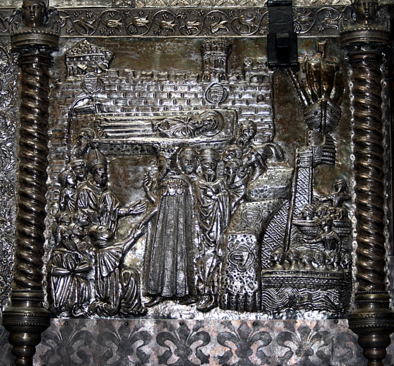 Škrinja Sv. Šimuna u Hrvatskoj akademiji znanosti i umjetnosti u Zagrebu. Prizor na škrinji: Ludovik I. Anžuvinac ulazi u Zadar.